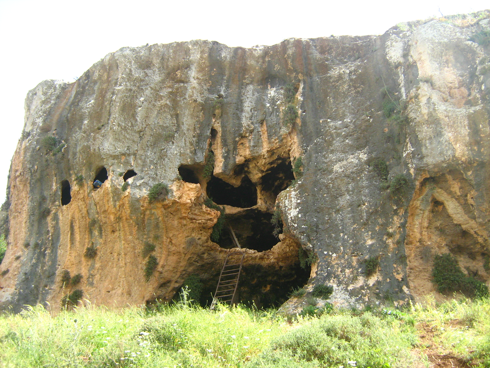 מערה בנחל אביב